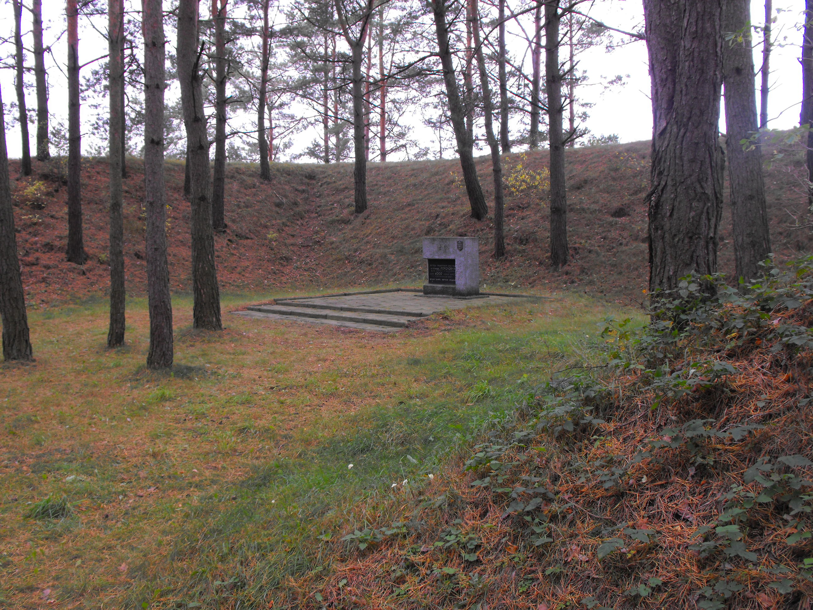 Волковыск, урочище Пороховня. Мемориальный знак на одном из мест убийств и захоронений евреев Волковыска и близлежащих деревень. Сейчас - территория городского кладбища.